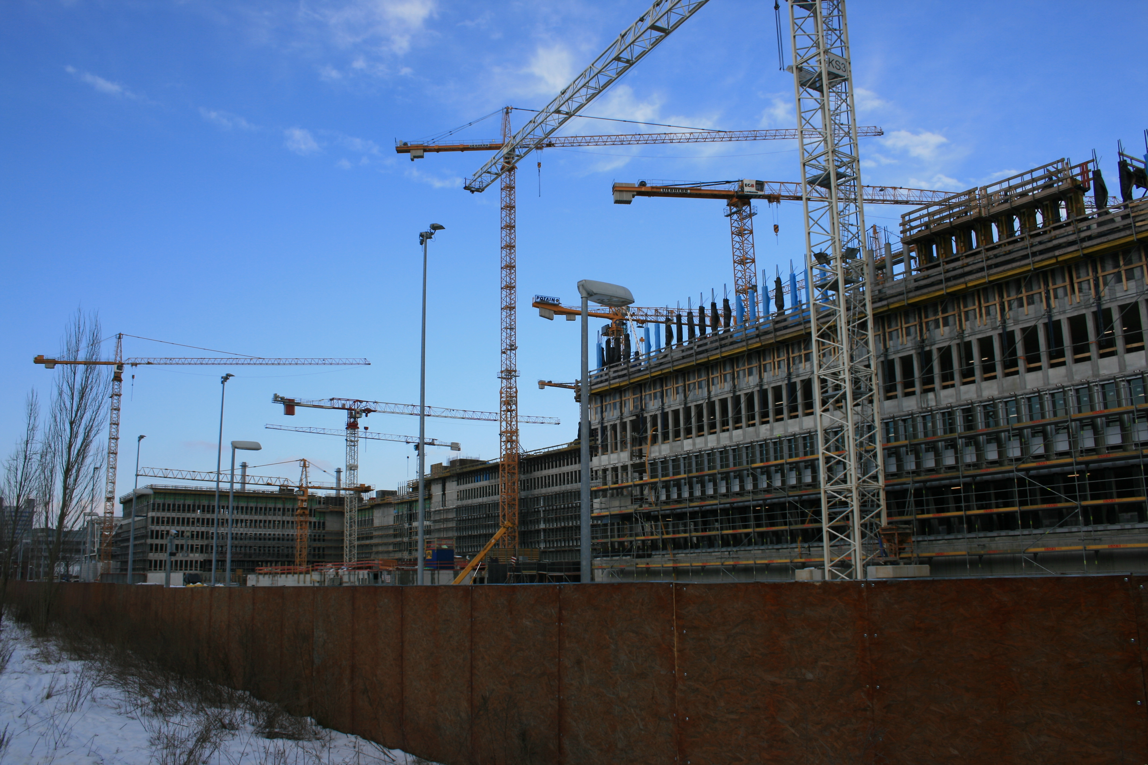 Baustelle des neuen BND-Gebäudes (Einsicht von hinten)